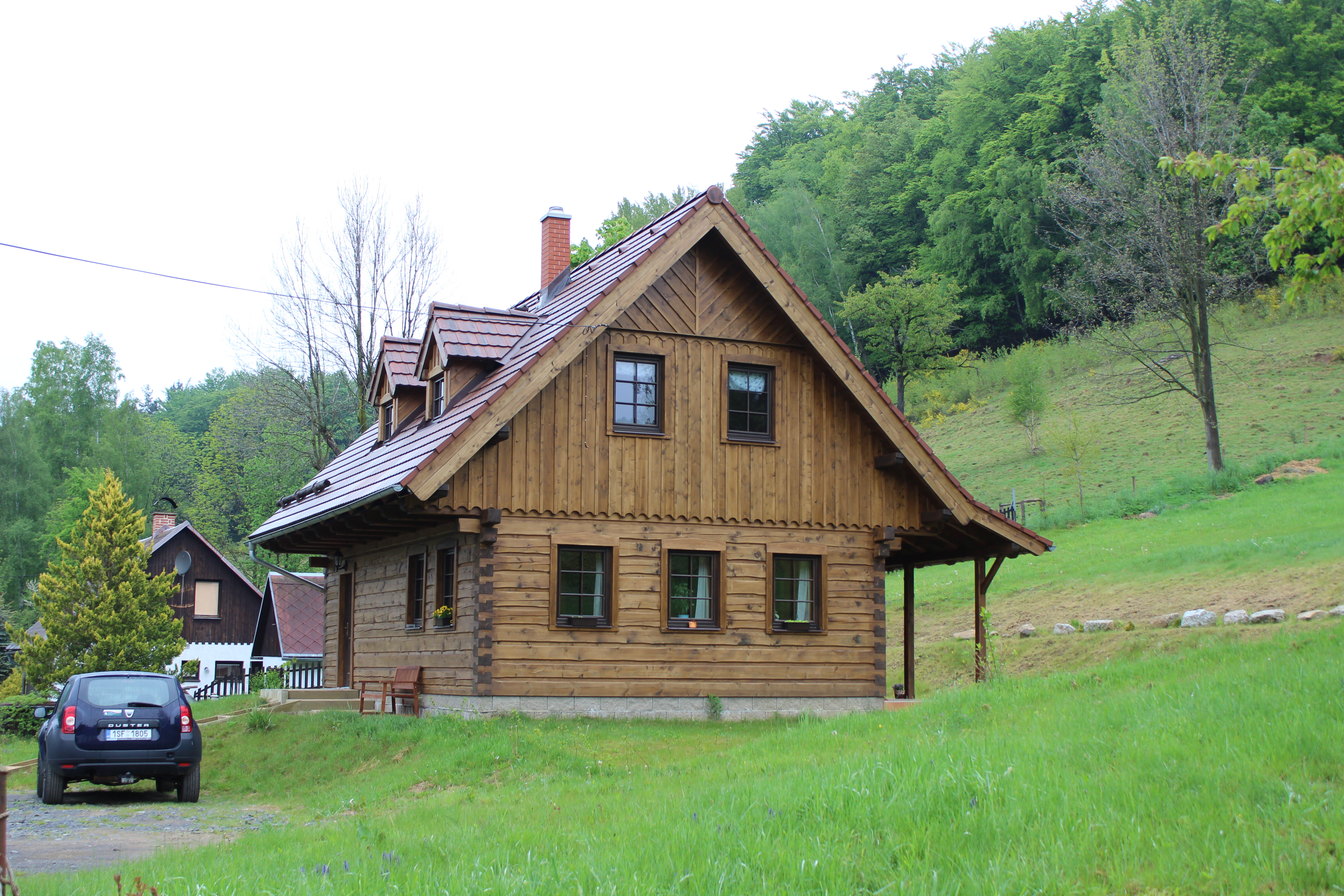 Srub v Pekle, části Raspenavy.